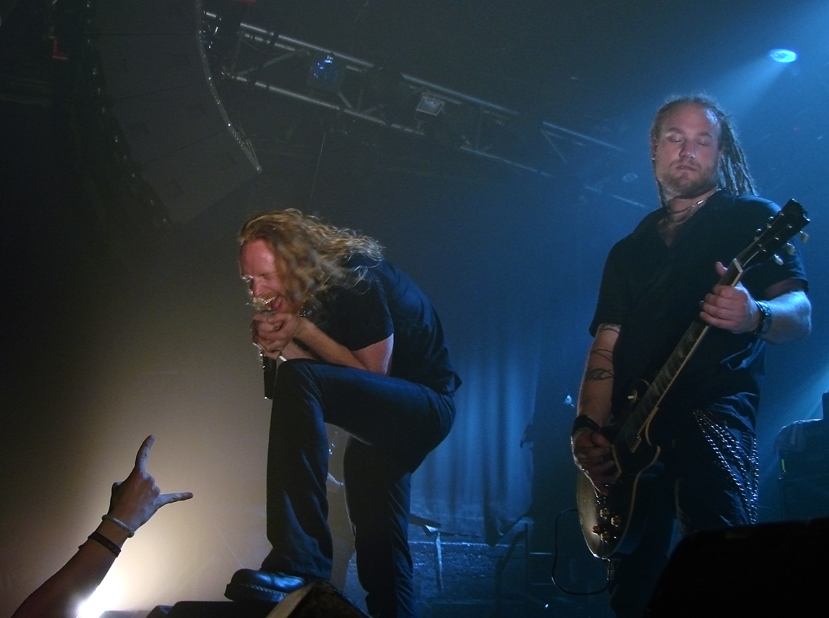 Dark Tanquillity, groupe suédois de Death Metal mélodique, en concert à la Locomotive, à Paris, le 28 Octobre 2008. Martin Henriksson à la guitare, Mikael Stanne au chant.